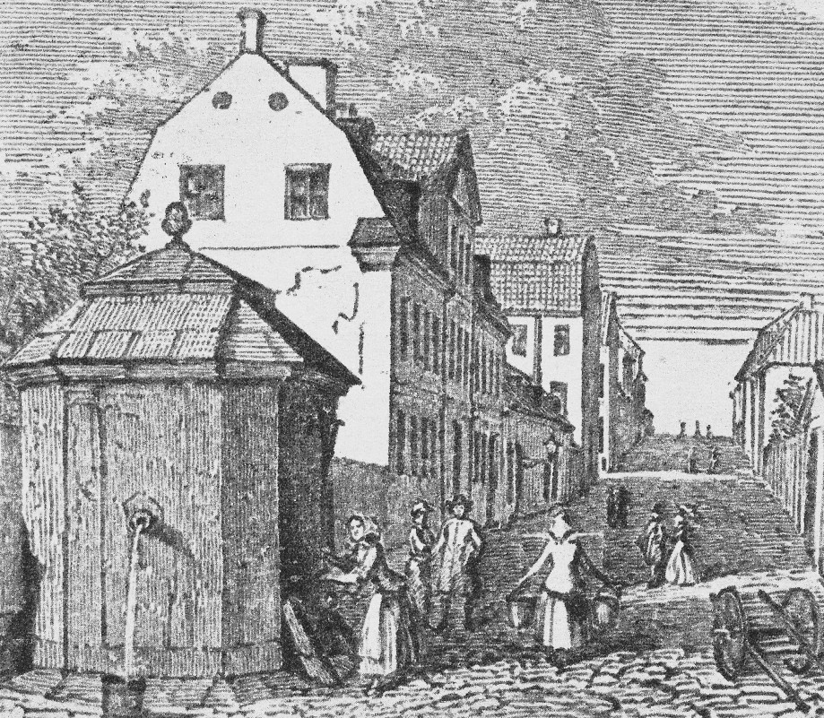 Stora Daurerska huset på Södermalm i Stockholm, xylografi efter teckning av Carl Svante Hallbeck, 1861. Bilden föreställer nuvarande Bellmansgatan med pumpen som gav namnet Maria Brunnsgränd, där Bellman var född "i egendomen N:o 24 vid denna gata". Han var i verkligheten född i nr 22, det s.k. Daurerska huset, som låg i hörnet av Bellmansgatan och Hornsgatan.